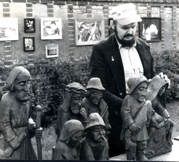 Stanisław Żyrek, rzeźbiarz ludowy, wystawa artystów Pomorza, Prabuty 1975, zdjęcie-archiwum rodzinne